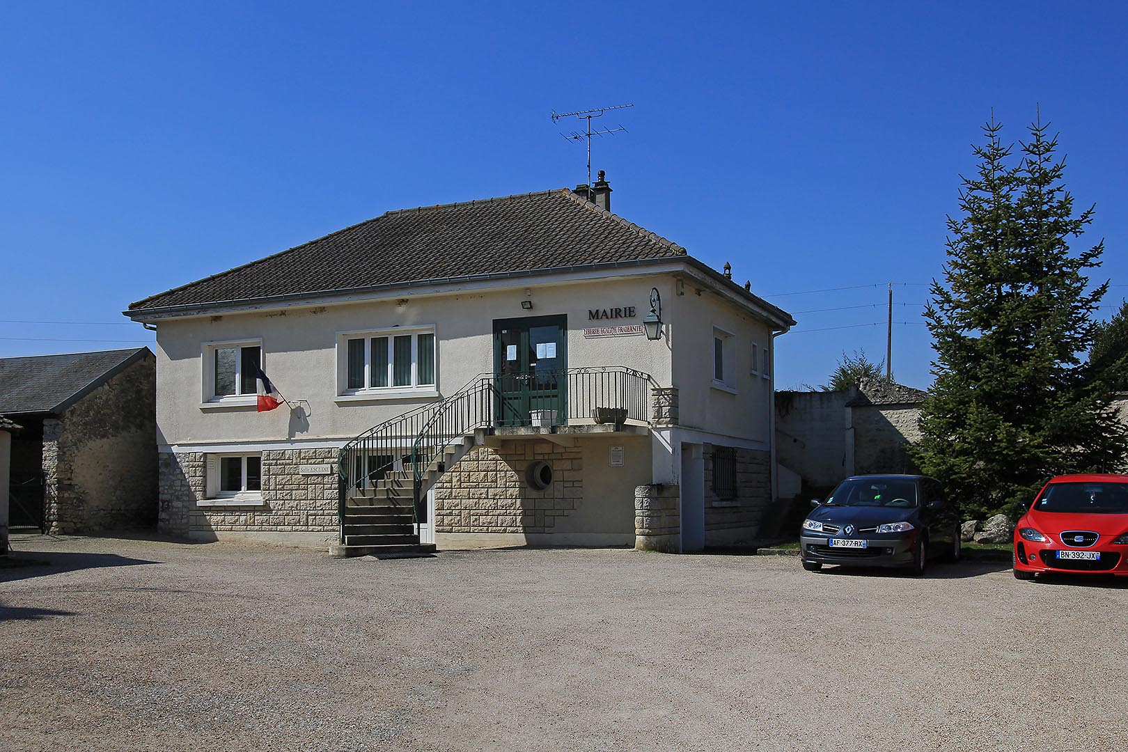 mairie de Mespuits